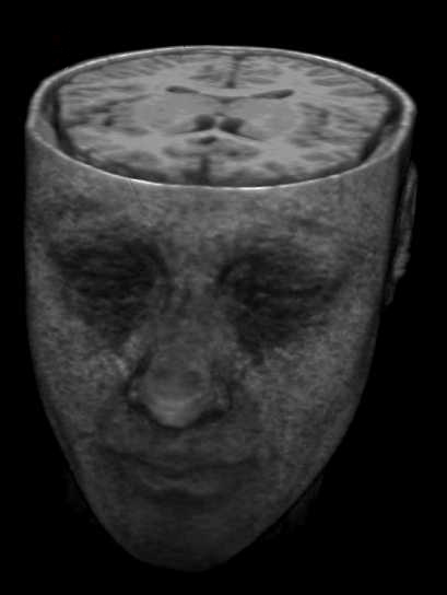 3D-Volume-Rendering eines MRT-Datensatzes